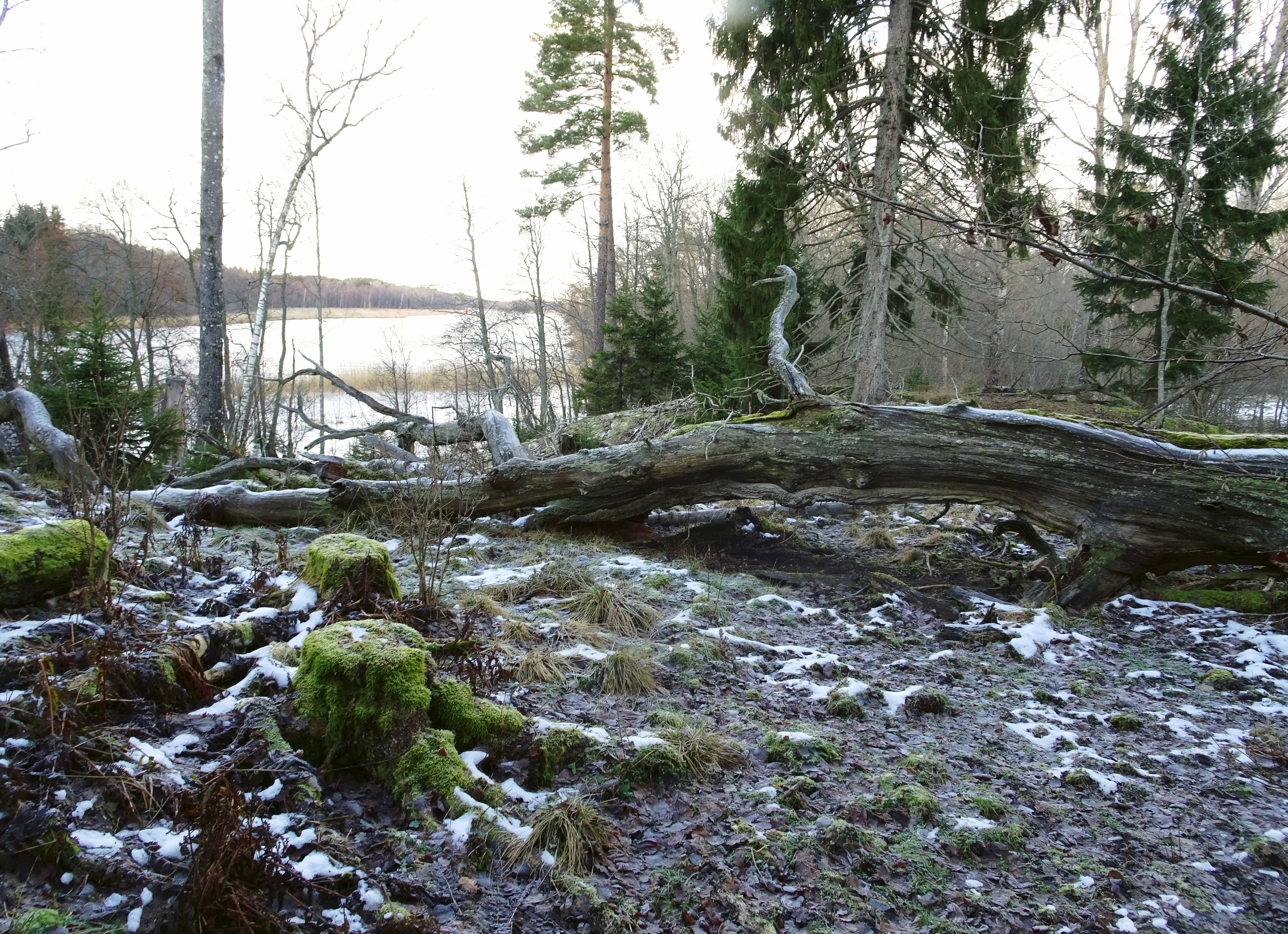 Koholmens naturreservat, Nyköpings kommun